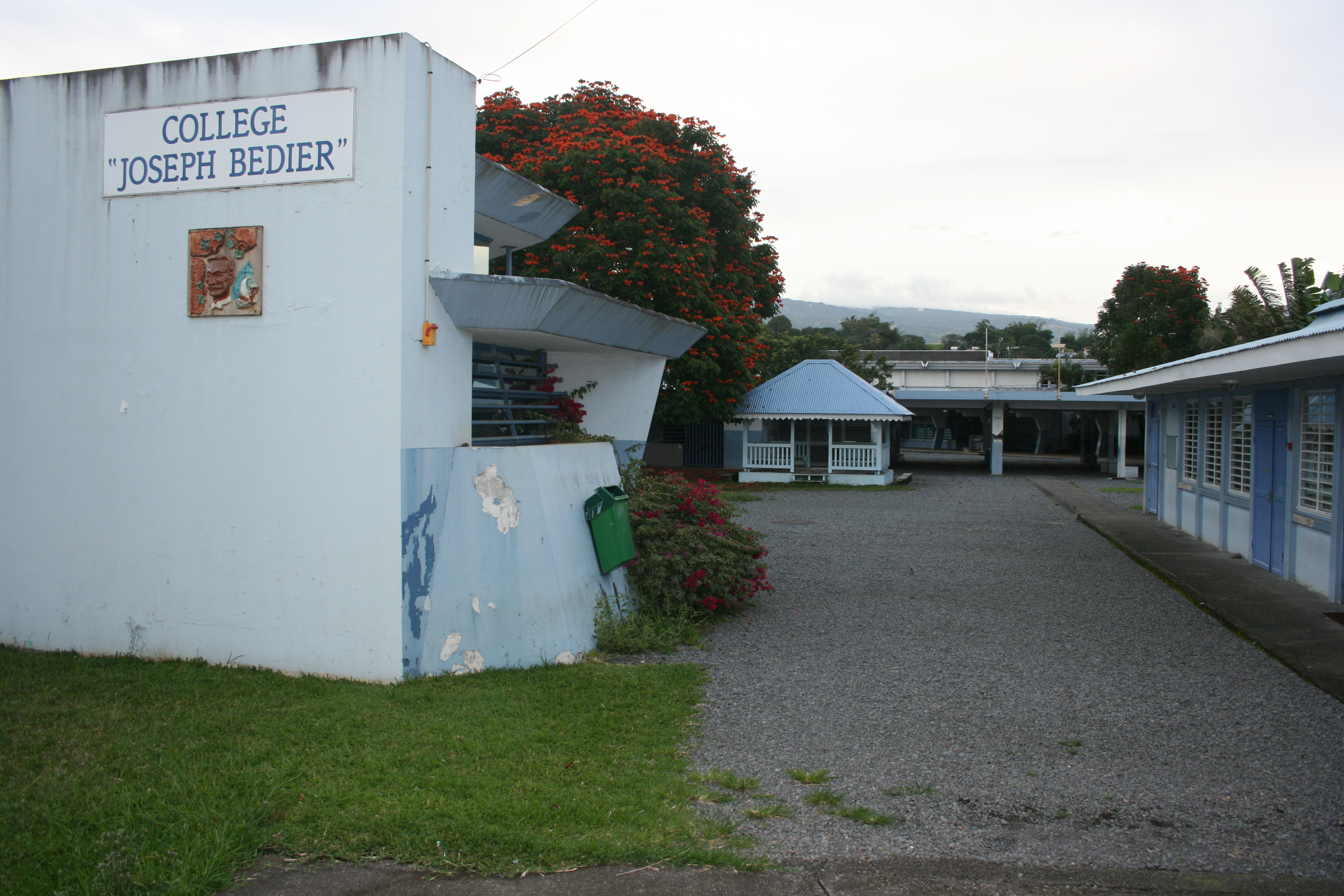 L'entrée du collège Joseph Bédier, à Saint-André, sur l'île de la Réunion